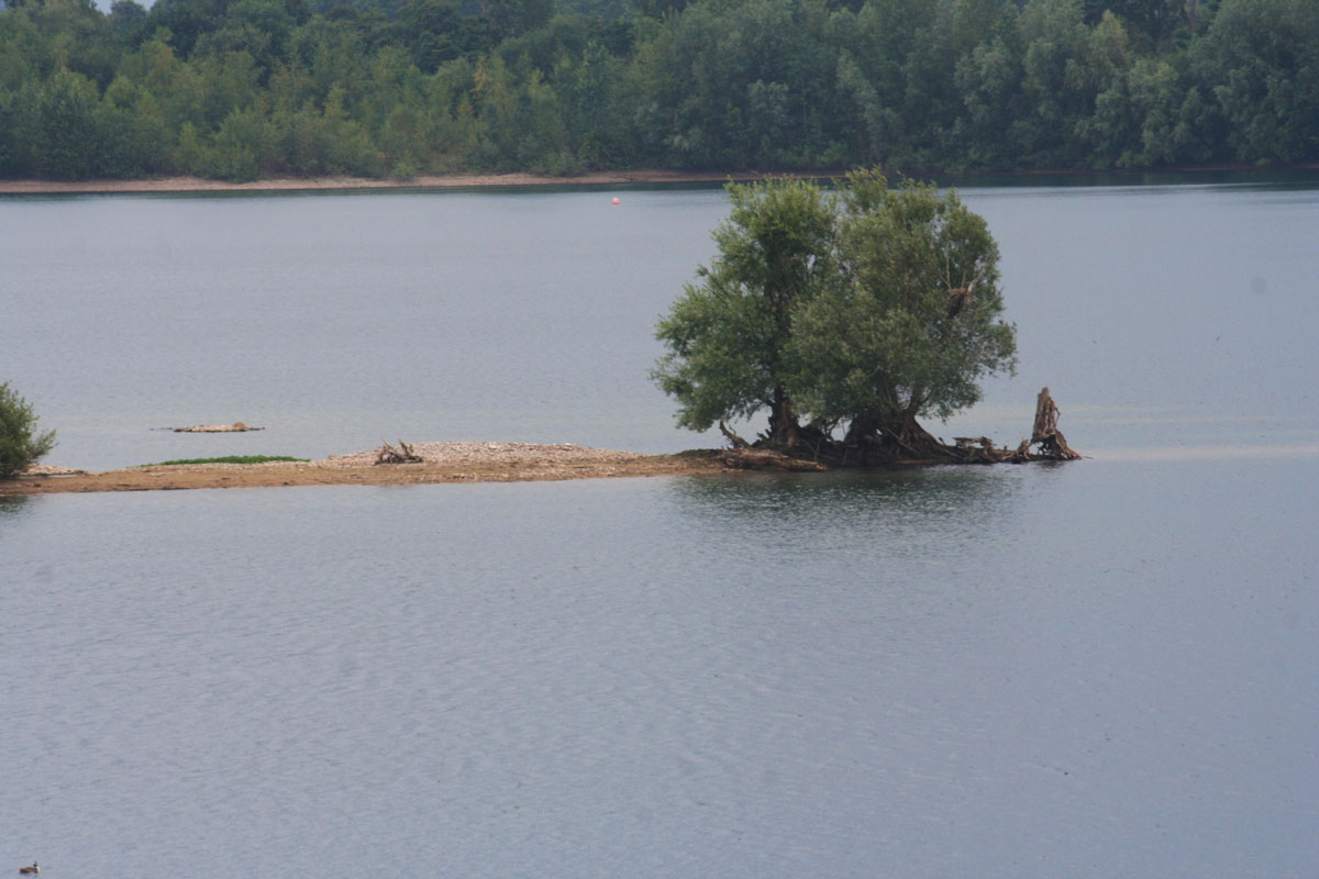 Naturschutzgebiet „Monheimer Baggersee“ (NSG ME-004), Blick in südliche Richtung